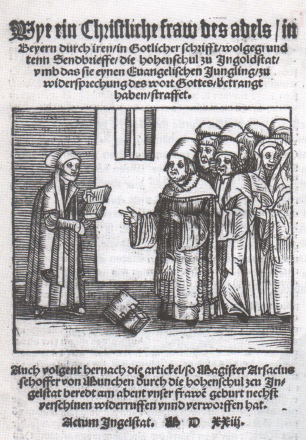 Page de titre du pamphlet le plus célèbre de la Réformatrice Argula von Grumbach, Wie ain Christliche Fraw des Adels [...].